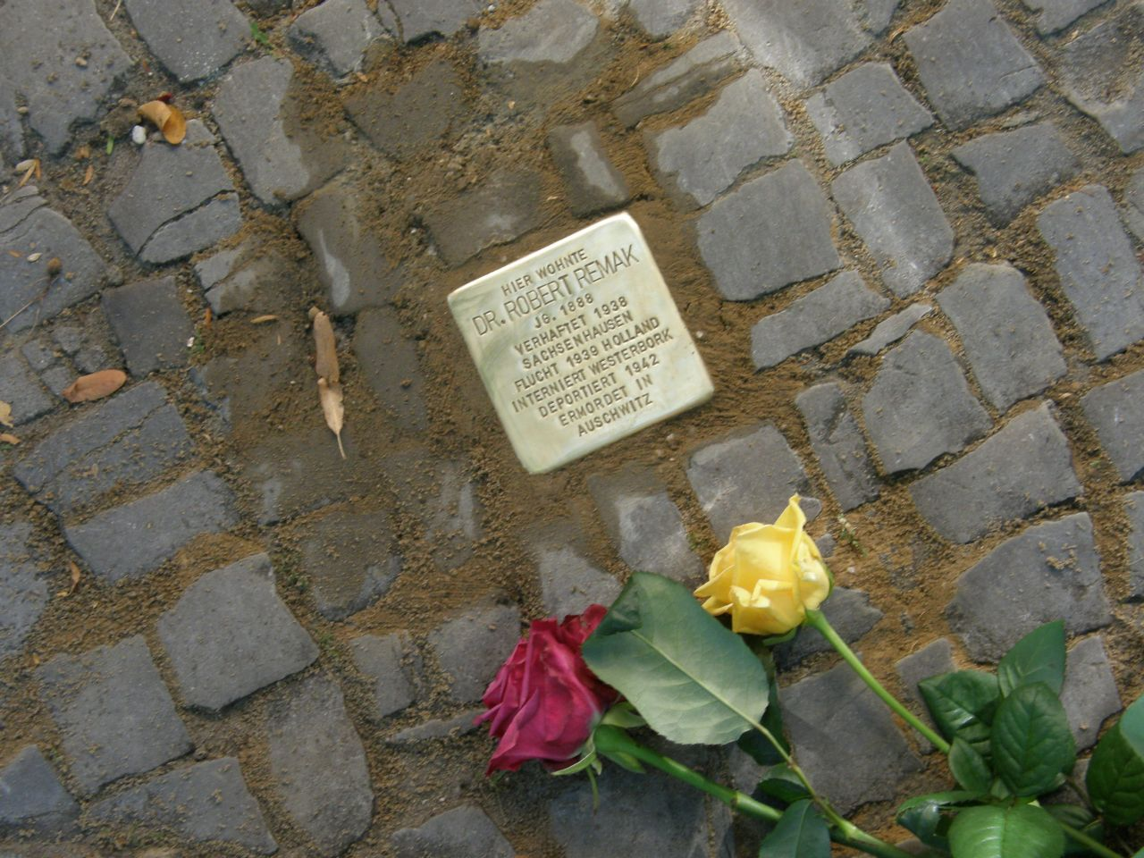 Stolperstein für Dr. Robert Remak, Manteuffelstraße 22a, Berlin-Lichterfelde